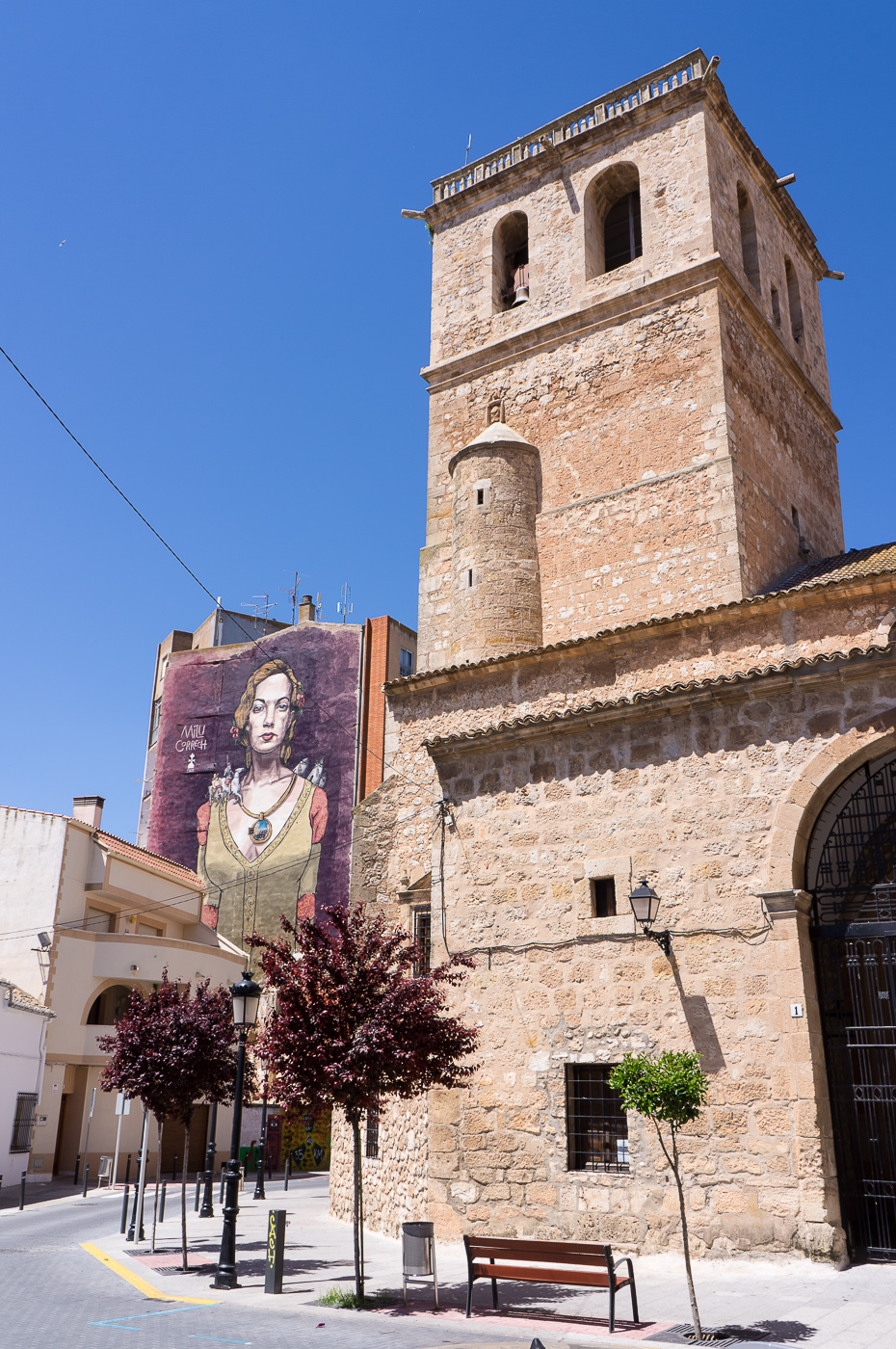 Lúcida locura - 24 Quintanar de la Orden.